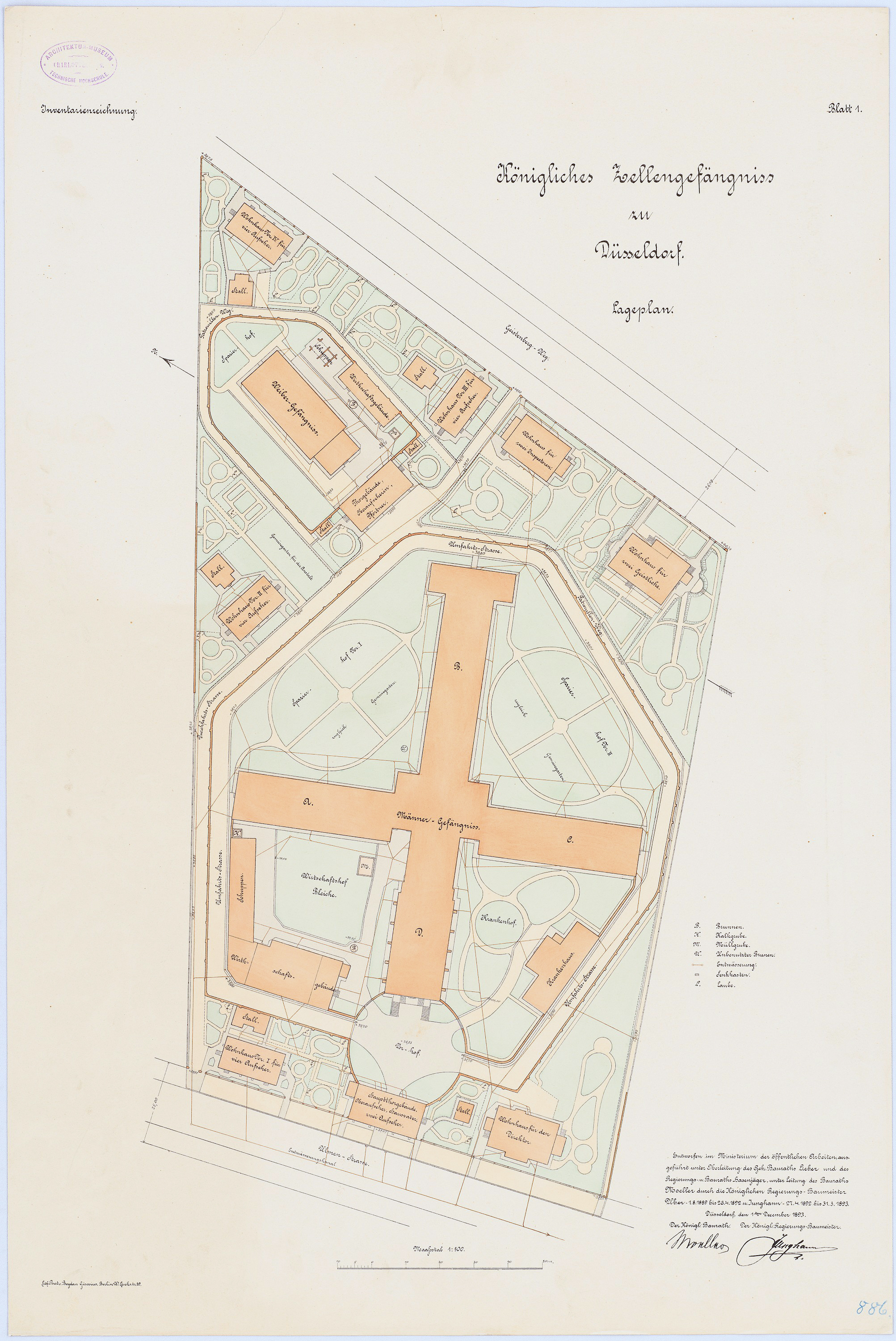 Hasenjäger Emil (geb. 1838), Zellengefängnis, Düsseldorf: Lageplan 1:500. Lithographie farbig auf Karton, 78,00 x 52,00 cm (inkl. Scanrand). Architekturmuseum der Technischen Universität Berlin Inv. Nr. 30908.